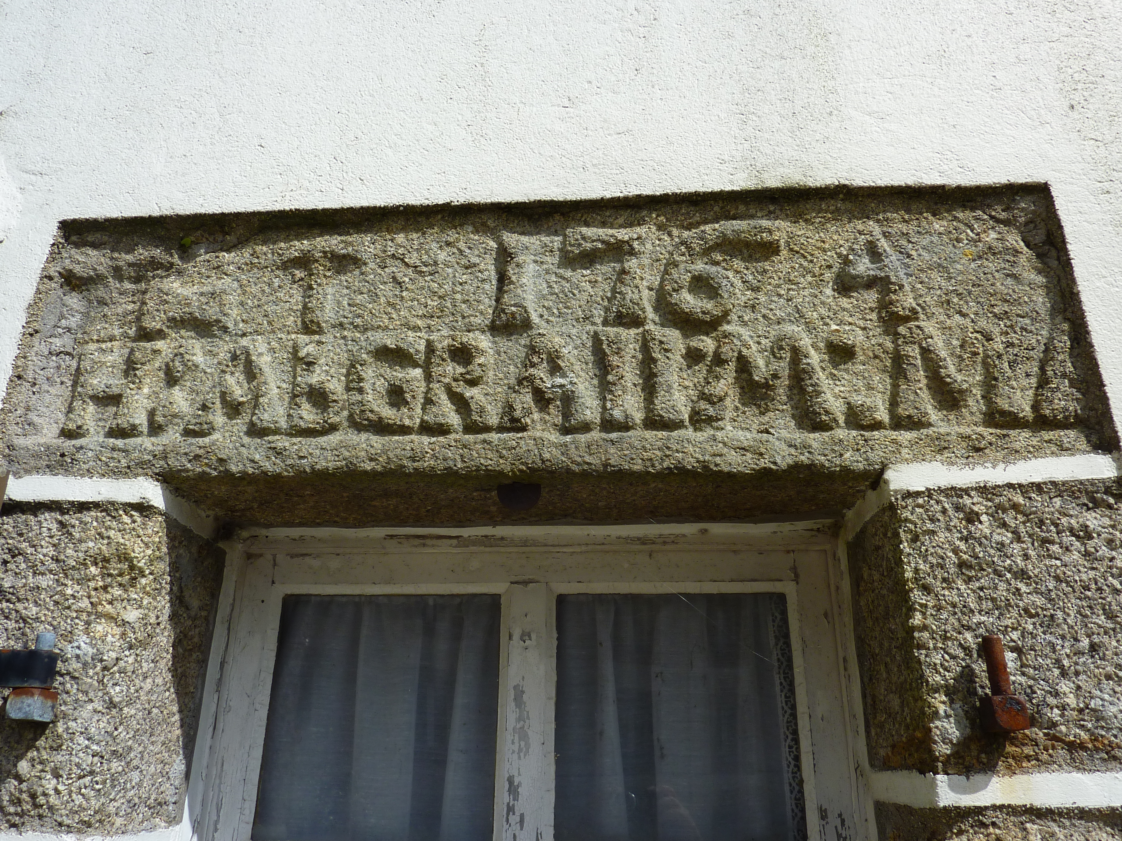 Inscription sur un linteau Plounéour-Ménez